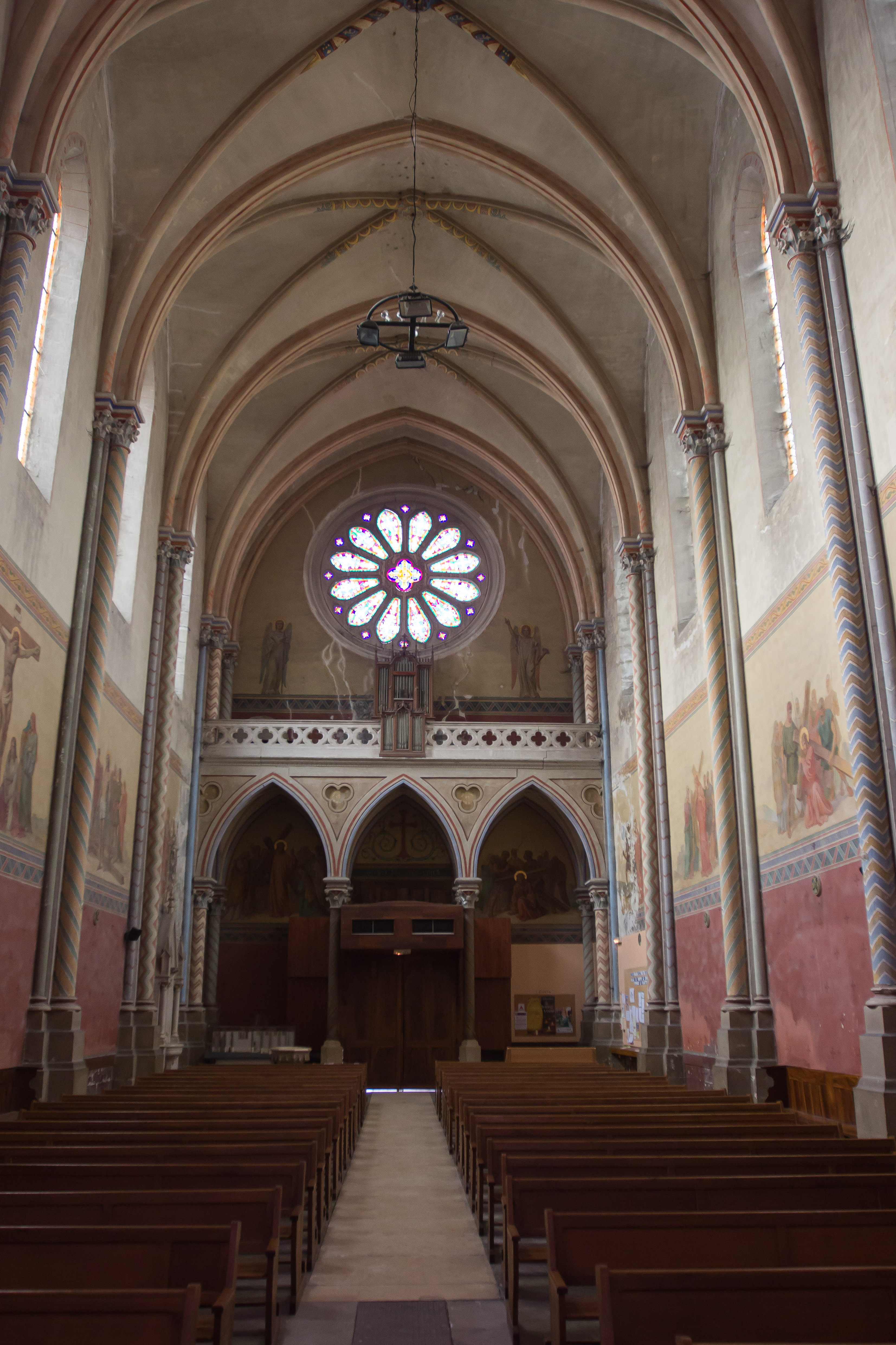 Vue de l'intérieur de l'église Saint-Didier de Voreppe (Voreppe, Isère, France)